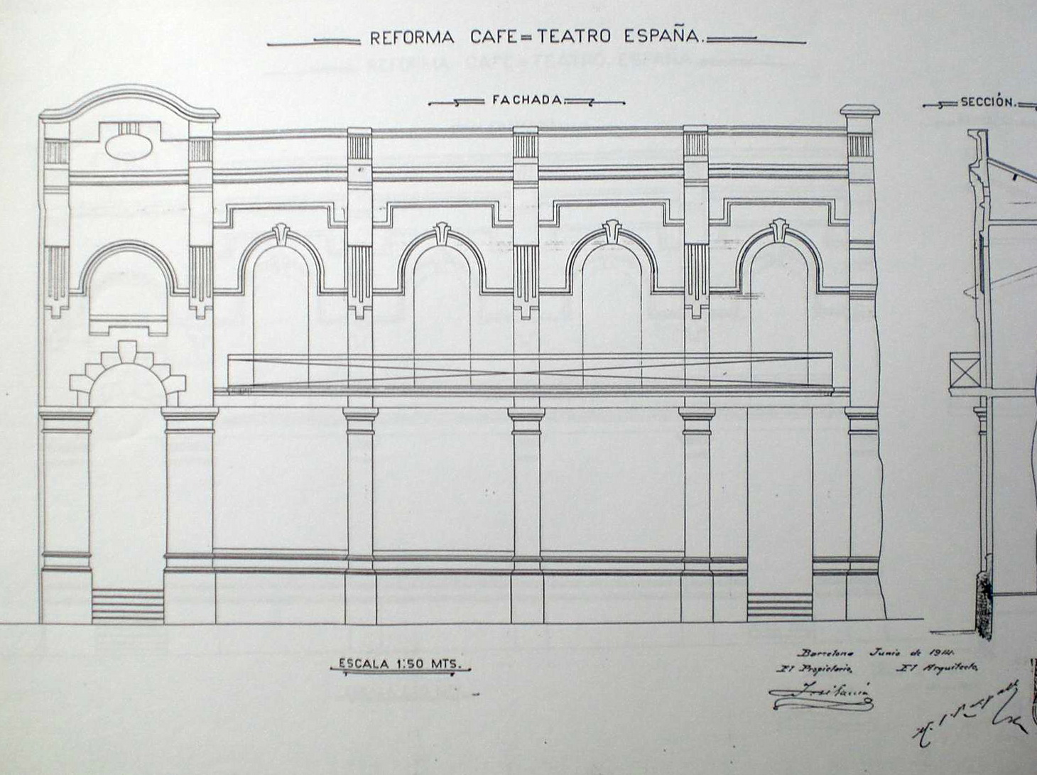 Plànol d'alçat del «teatre Espanya» que va existir entre 1914-1929 a la cantonada del carrer Llúria amb Gran via de les Corts Catalanes a Barcelona (Catalunya), obra de Joaquim Raspall (desaparegut).